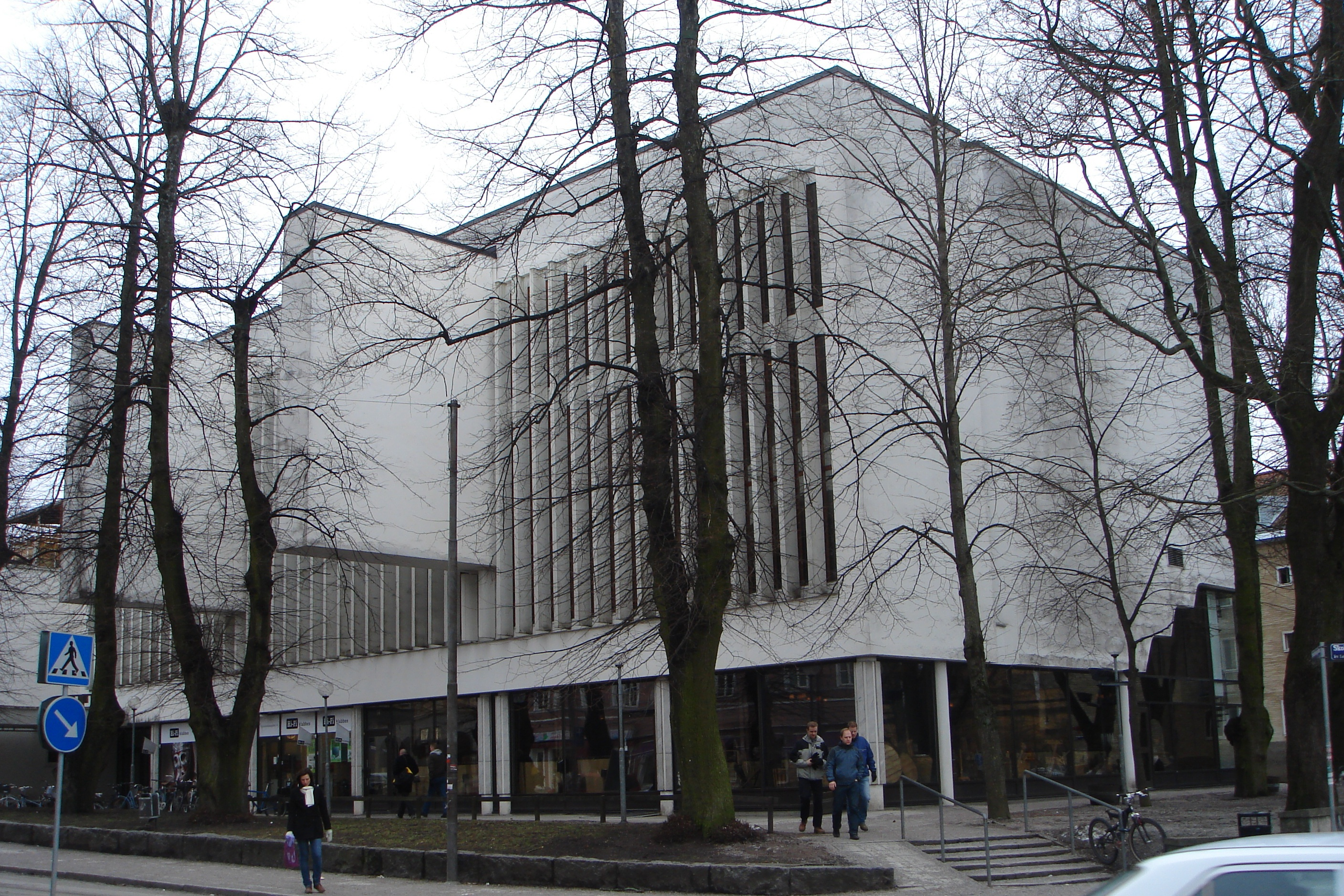 Västmanlands Dala nation, Uppsala, Sweden